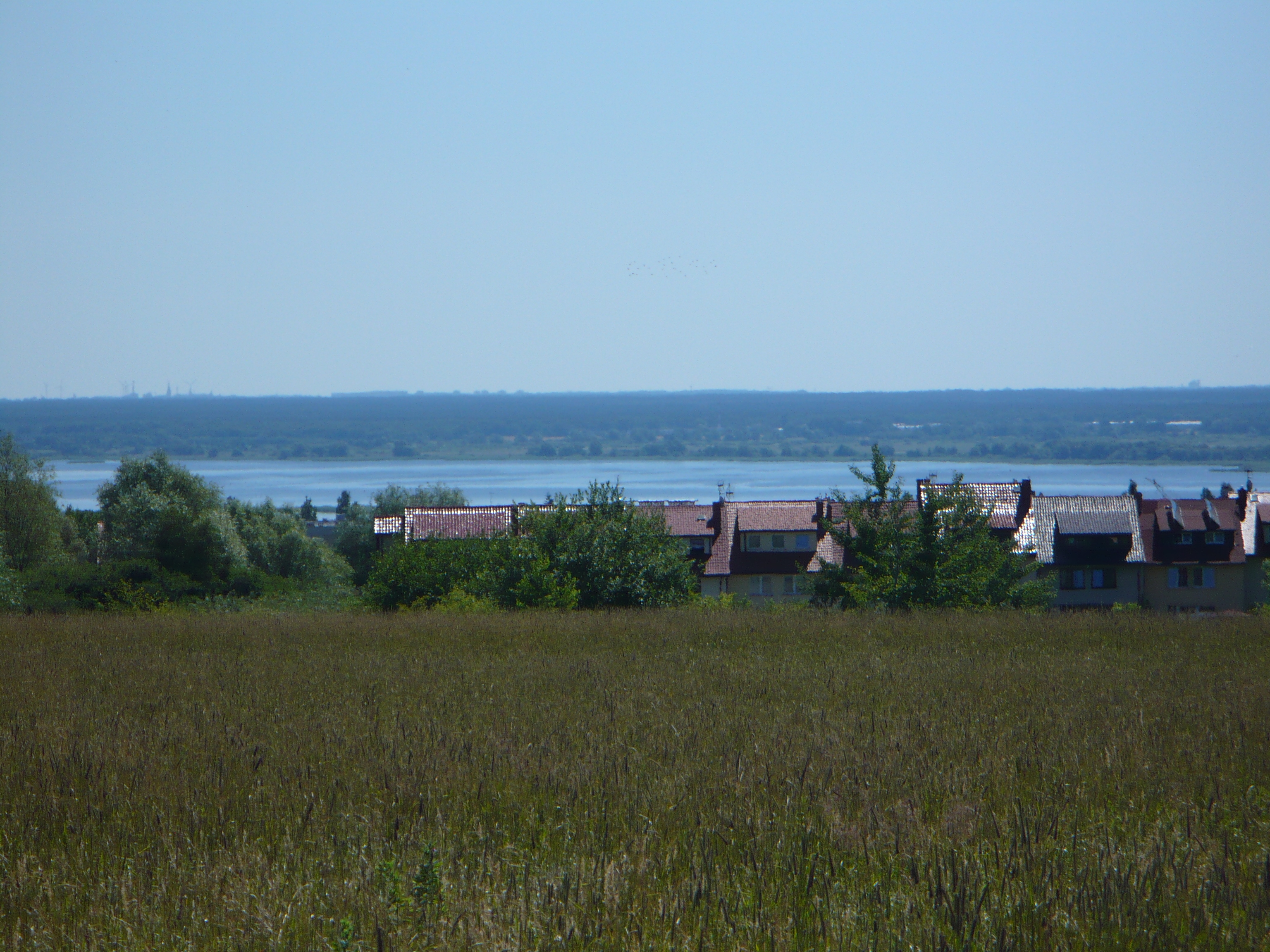 Jezioro Dąbie - zbliżenie ze Wzgórz Warszewskich. W tle Puszcza Goleniowska i Stargard Szczeciński.